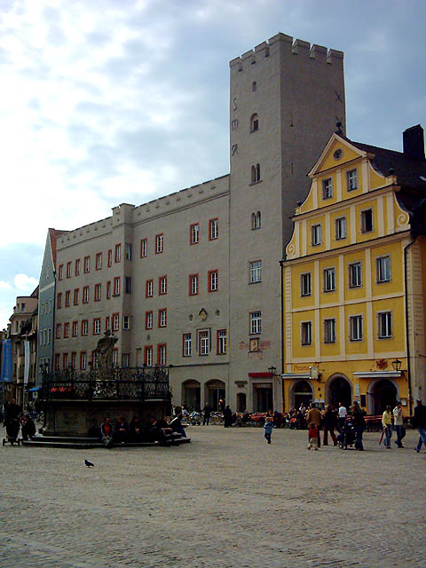 Regensburg, Bayern: Die Kaiserherberge am Haidplatz